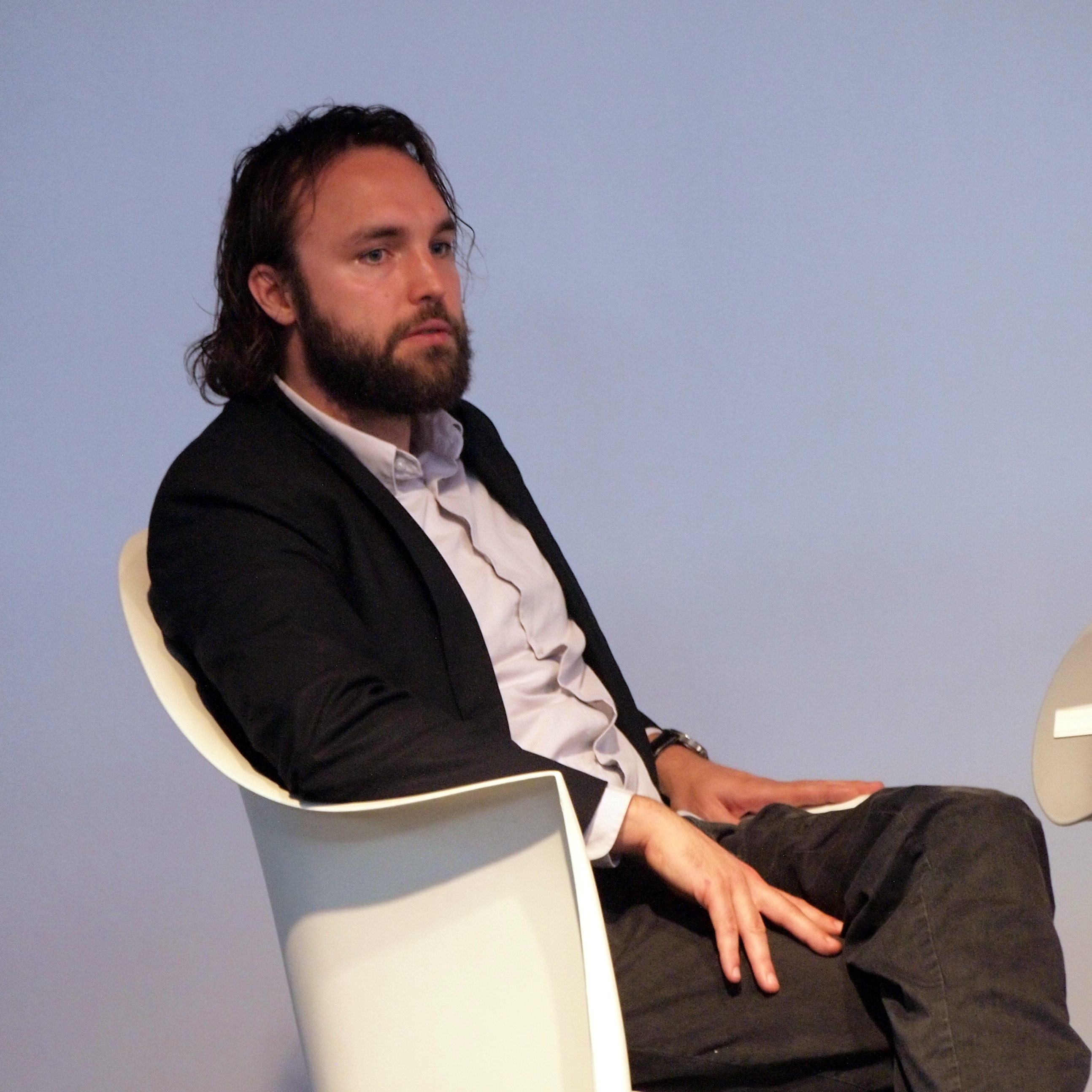 Isaak Dentler auf der Frankfurter Buchmesse 2014